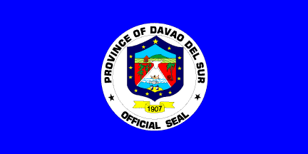 Dit materiaal is afkomstig van of en is door de auteur Jaume Ollé als GFDL beschikbaar gesteld, zie de toestemmingsemail. Hiermee vervallen de strictere voorwaarden in de disclaimers op de genoemde sites.Vrijgegeven bijdrage op Flags of the World van Jaume Olle. Zie deze verklaring op de Spaanstalige Wikipedia. GNU FDL